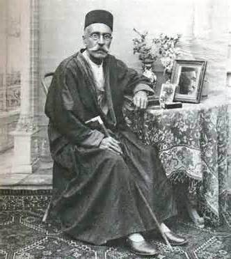 چهره نگار کازرونی